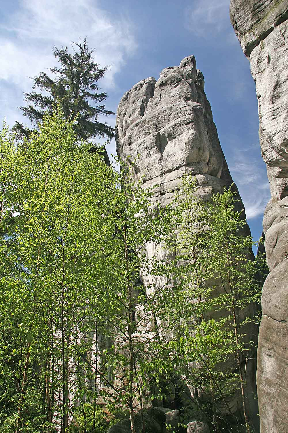 Skalní městno na konci hřebene Bialzch Skal ve Stolových horách v Polsku autor:Zp